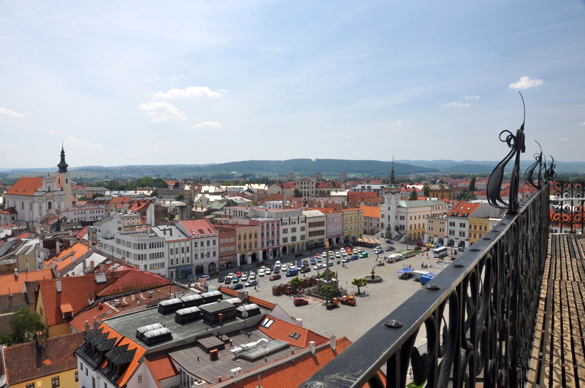 Kromeriz. Ausblick vom Schlossturm